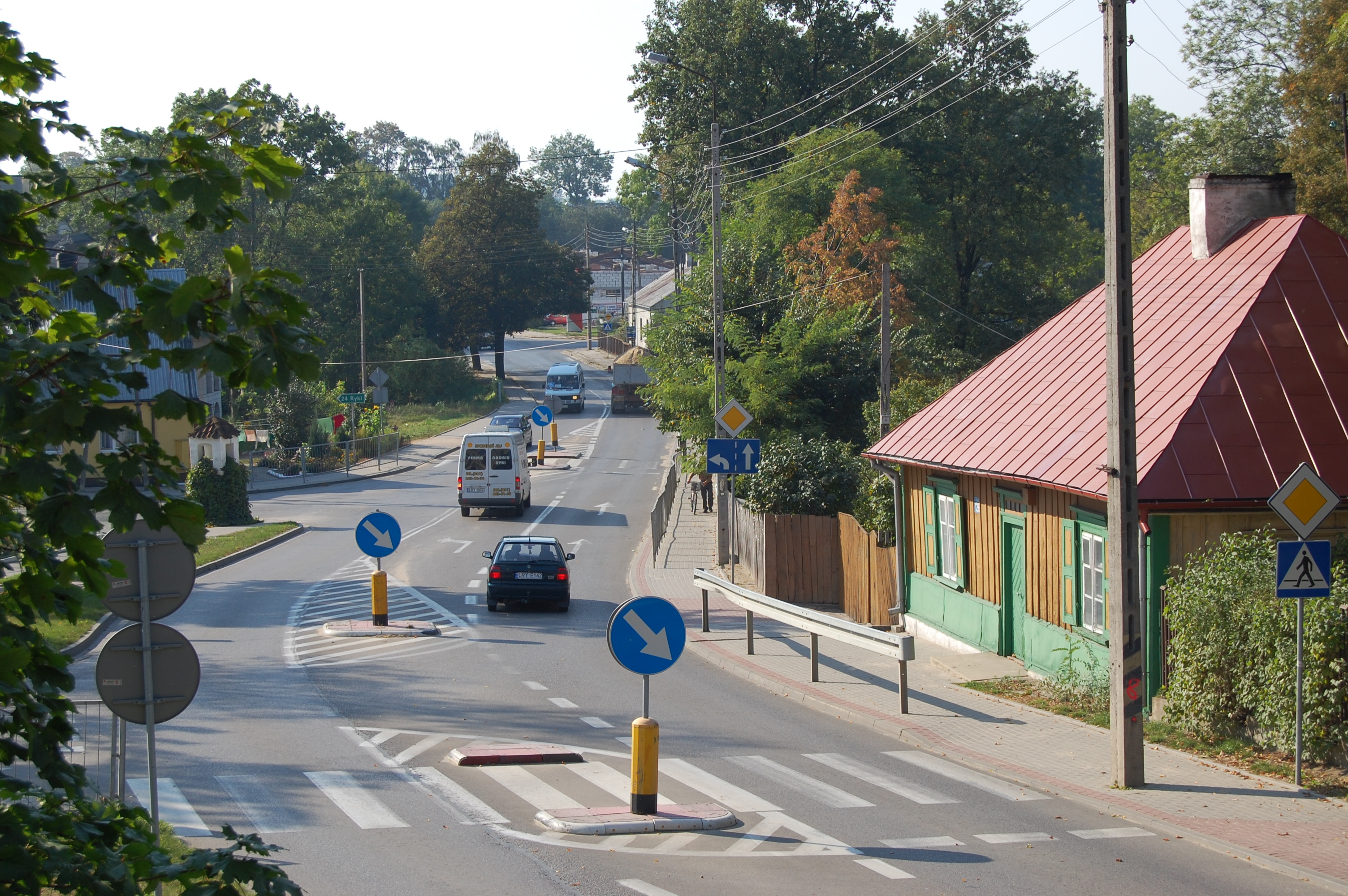 Dom przy ulicy Długiej 112 w Żelechowie